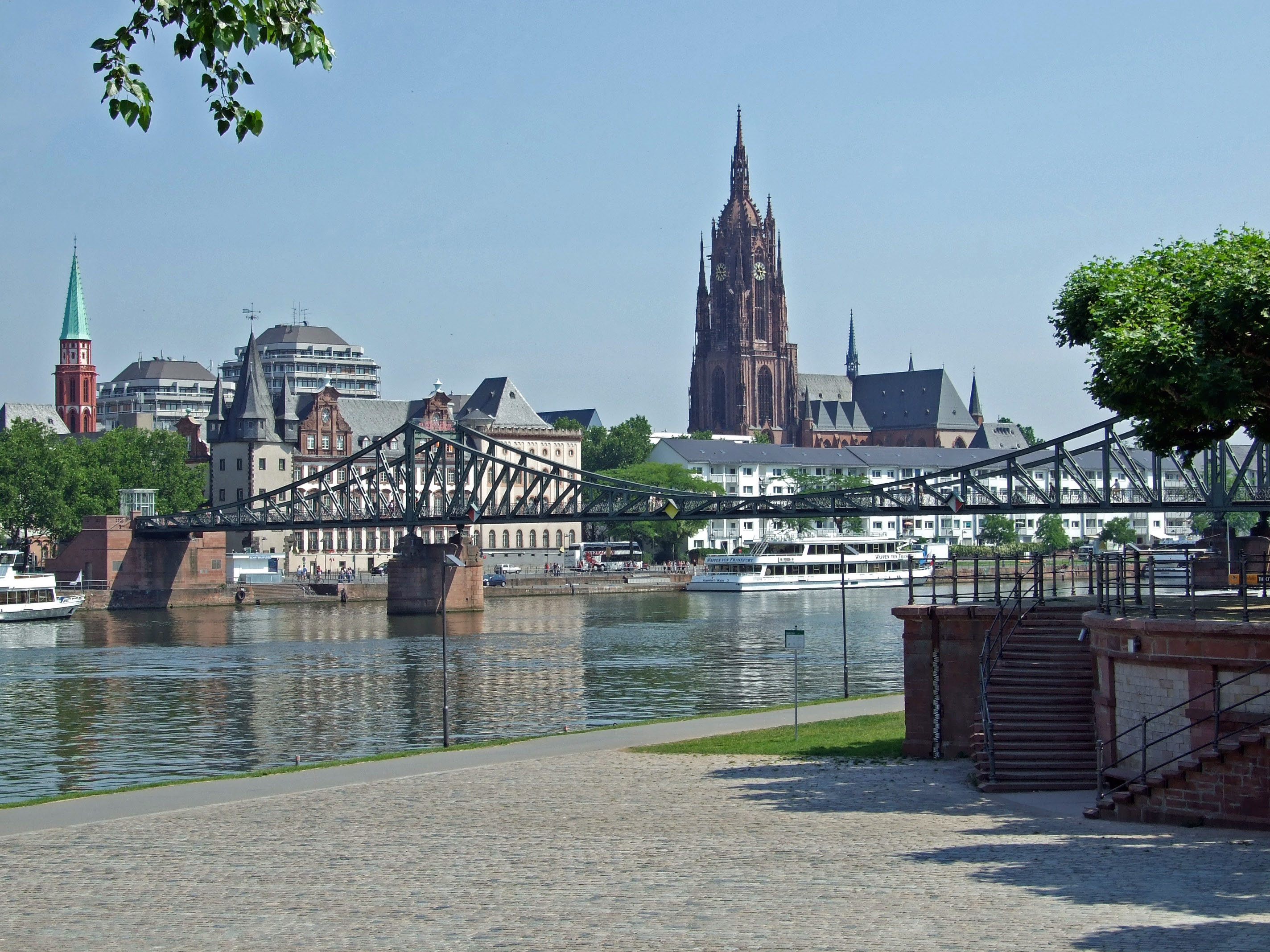 Dom in Ffm